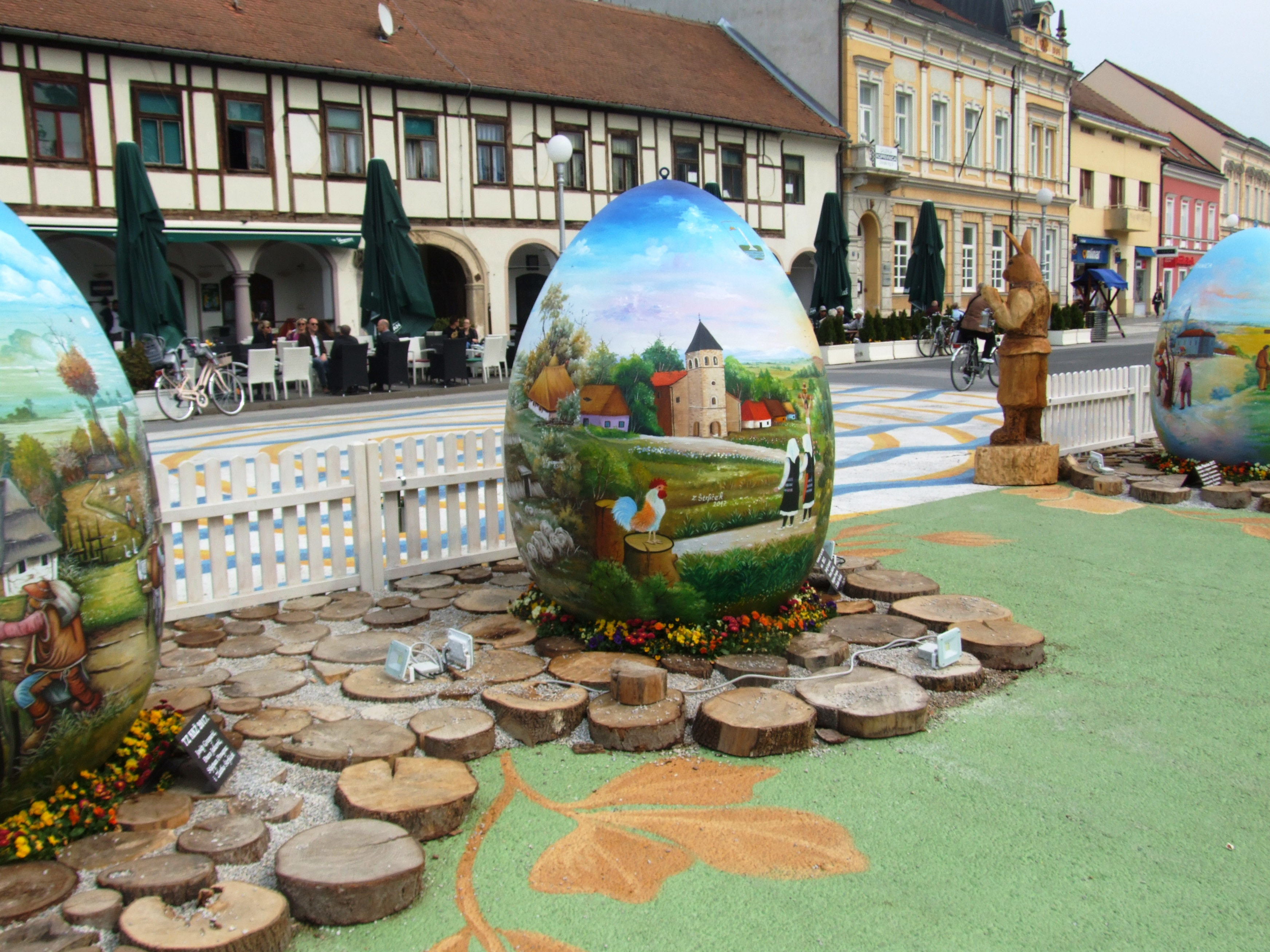 Húsvéti tojások a Főtéren.